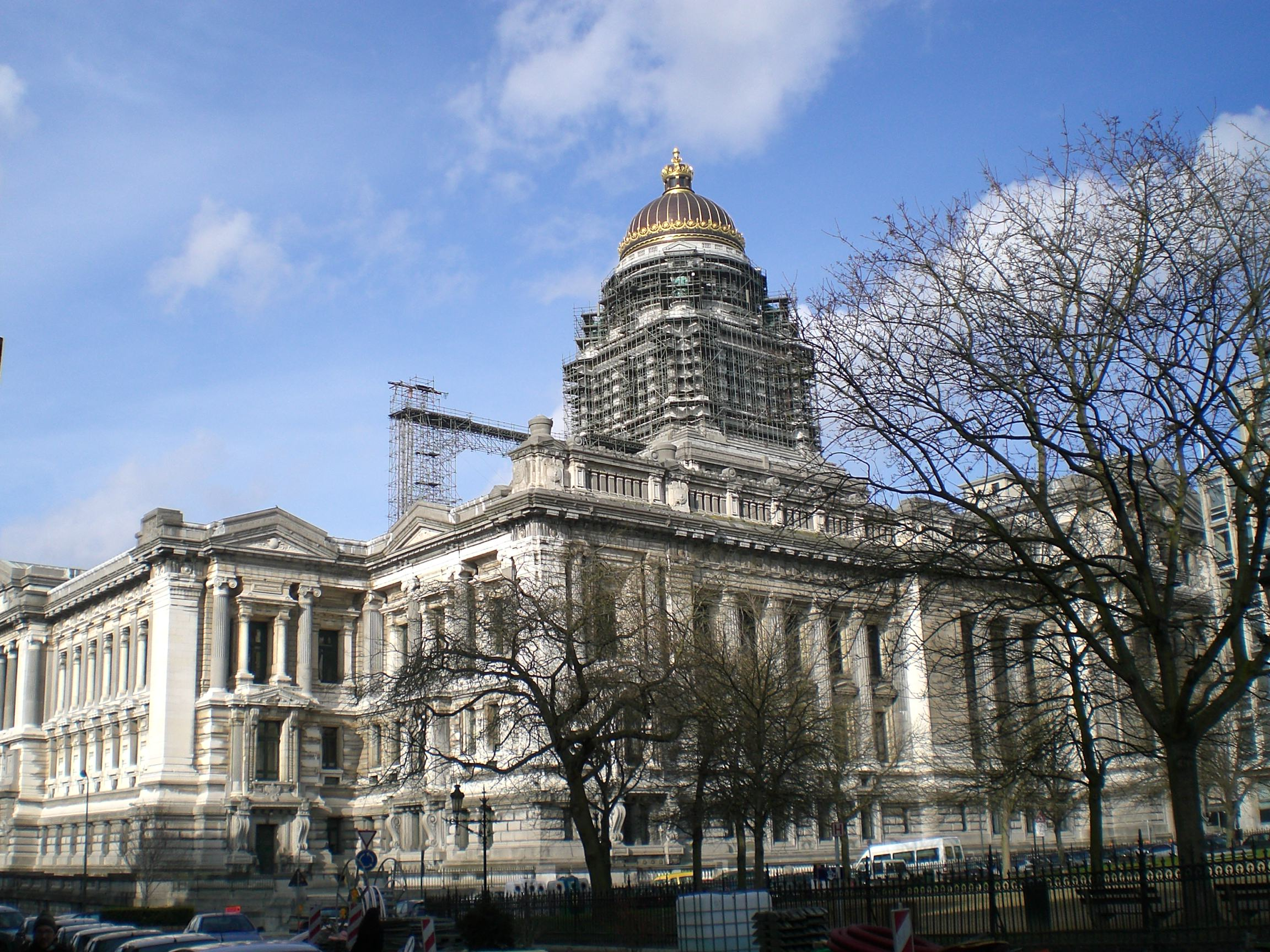 Palais de justice de Bruxelles en vue globale.